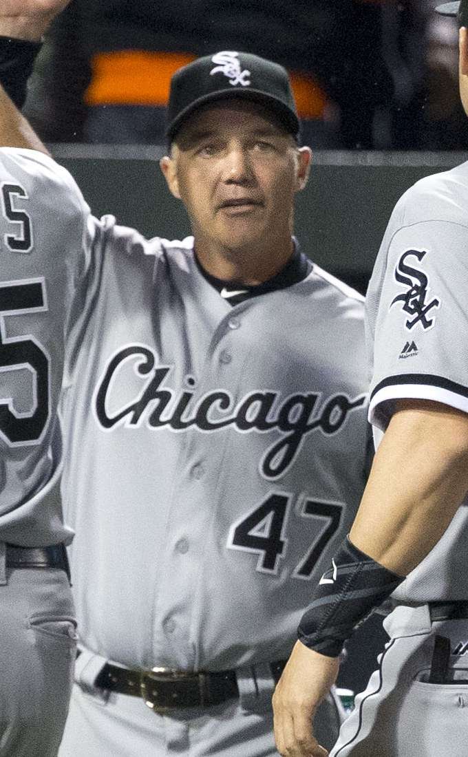 Joe McEwing